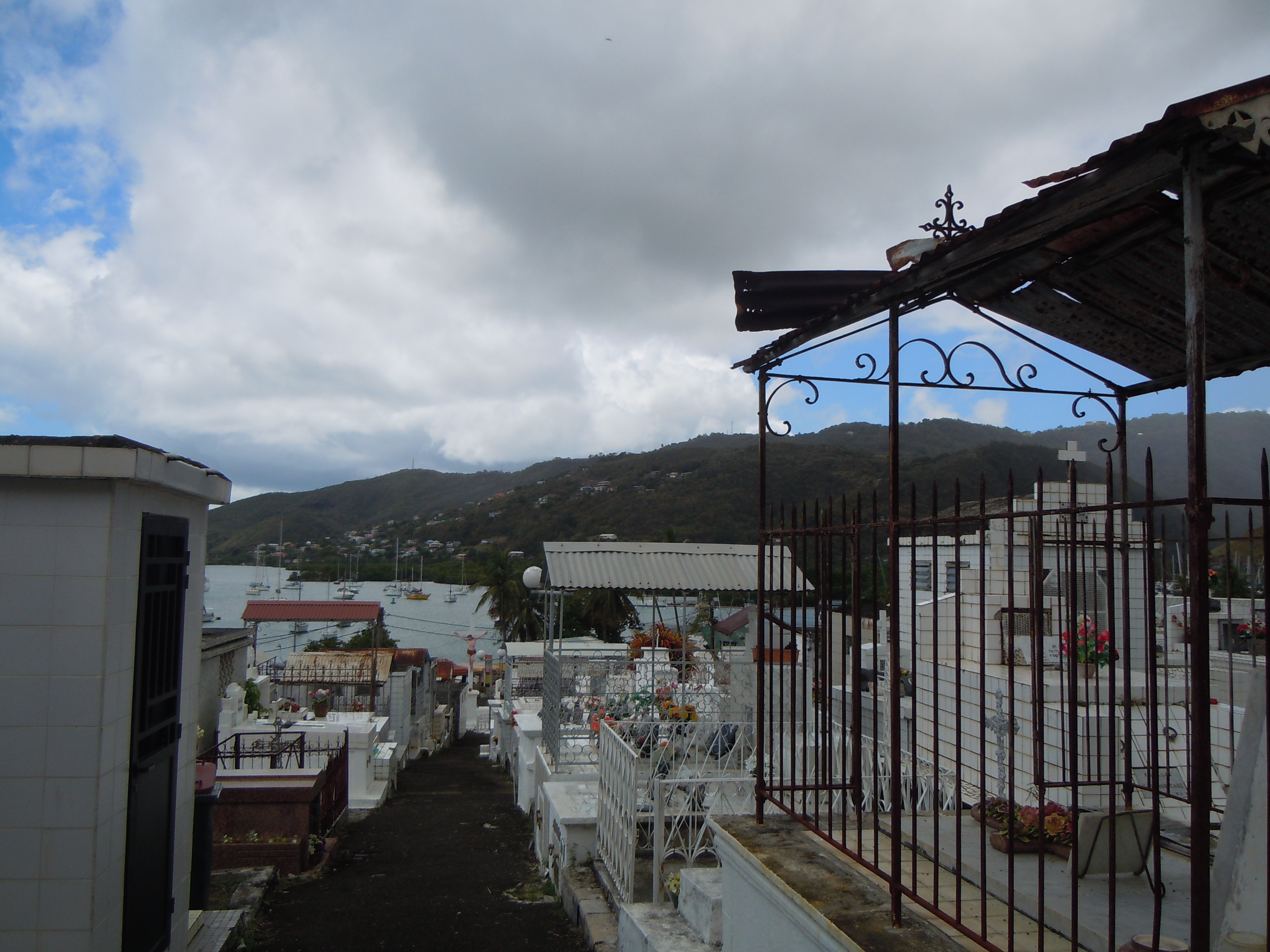 Cimetière du Marin, Le Marin, Martinique